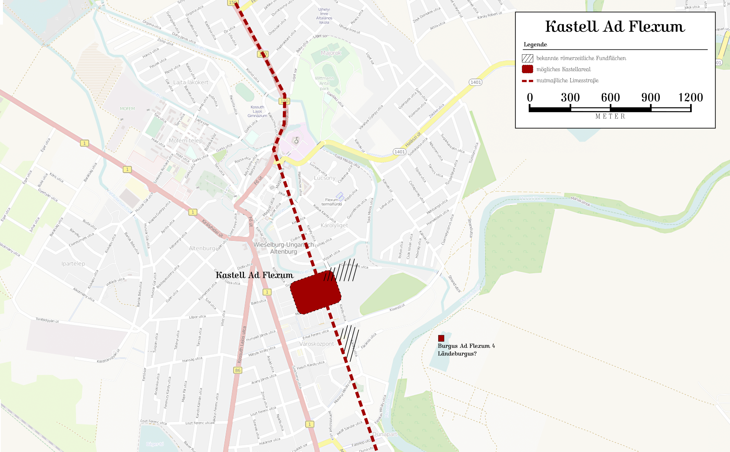 Kastell Ad Flexum mit Umfeld, Máriakálnok, Ungarn, Quelle: Zsolt Visy: The ripa Pannonica in Hungary. Akadémiai Kiadó, Budapest 2003, ISBN 963-05-7980-4. Karte: Openstreetmap (